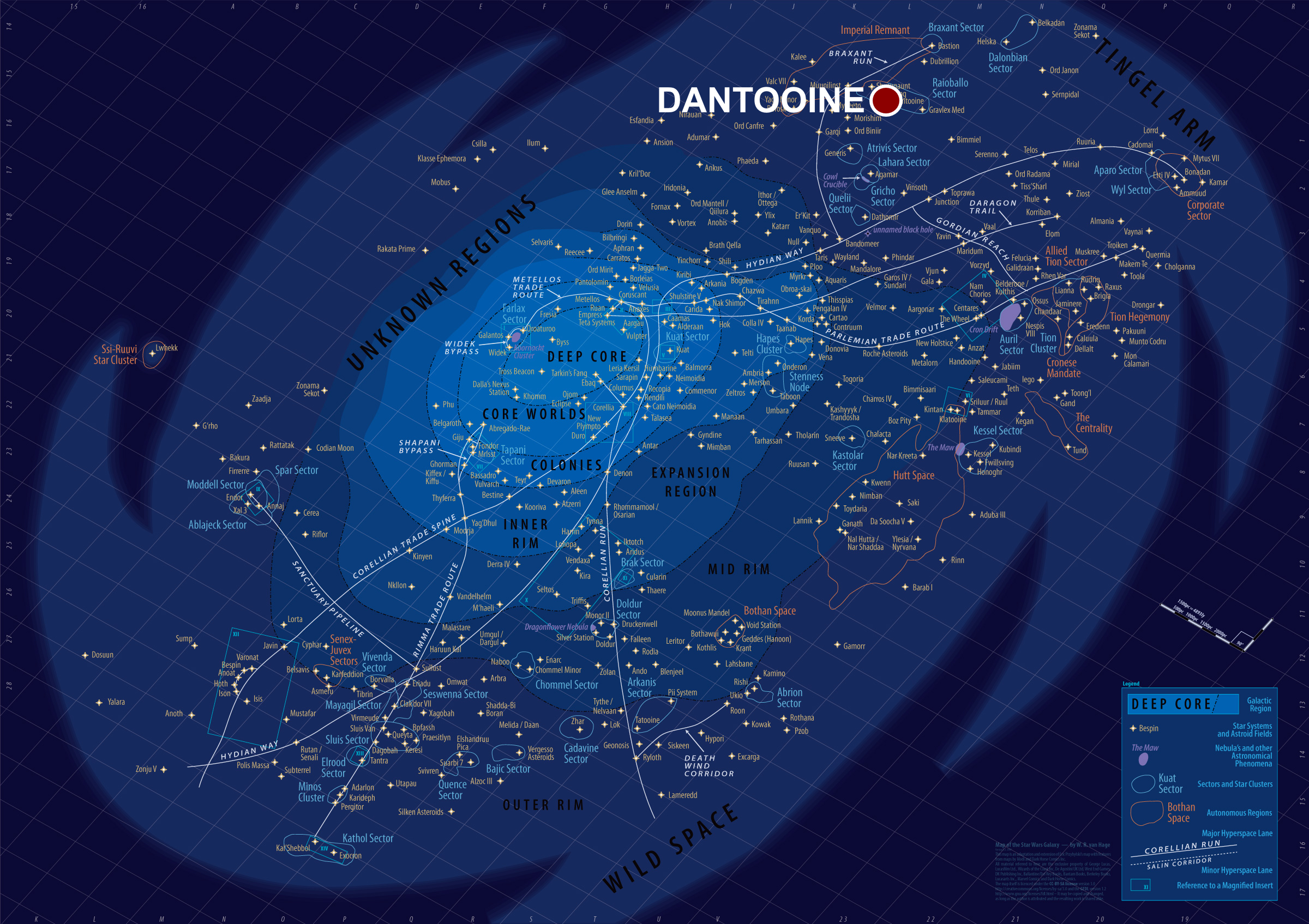 Localisation de Dantooine sur la carte Star Wars